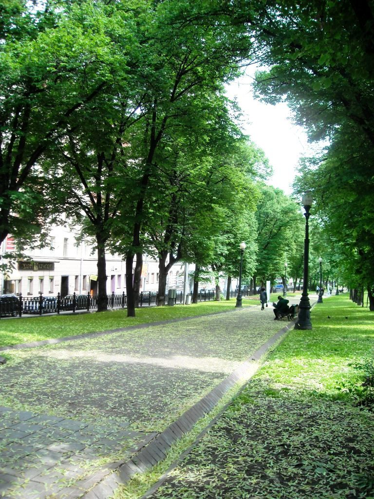 Петровский бульвар (Москва и Московская область, Москва, Петровский бульв.)